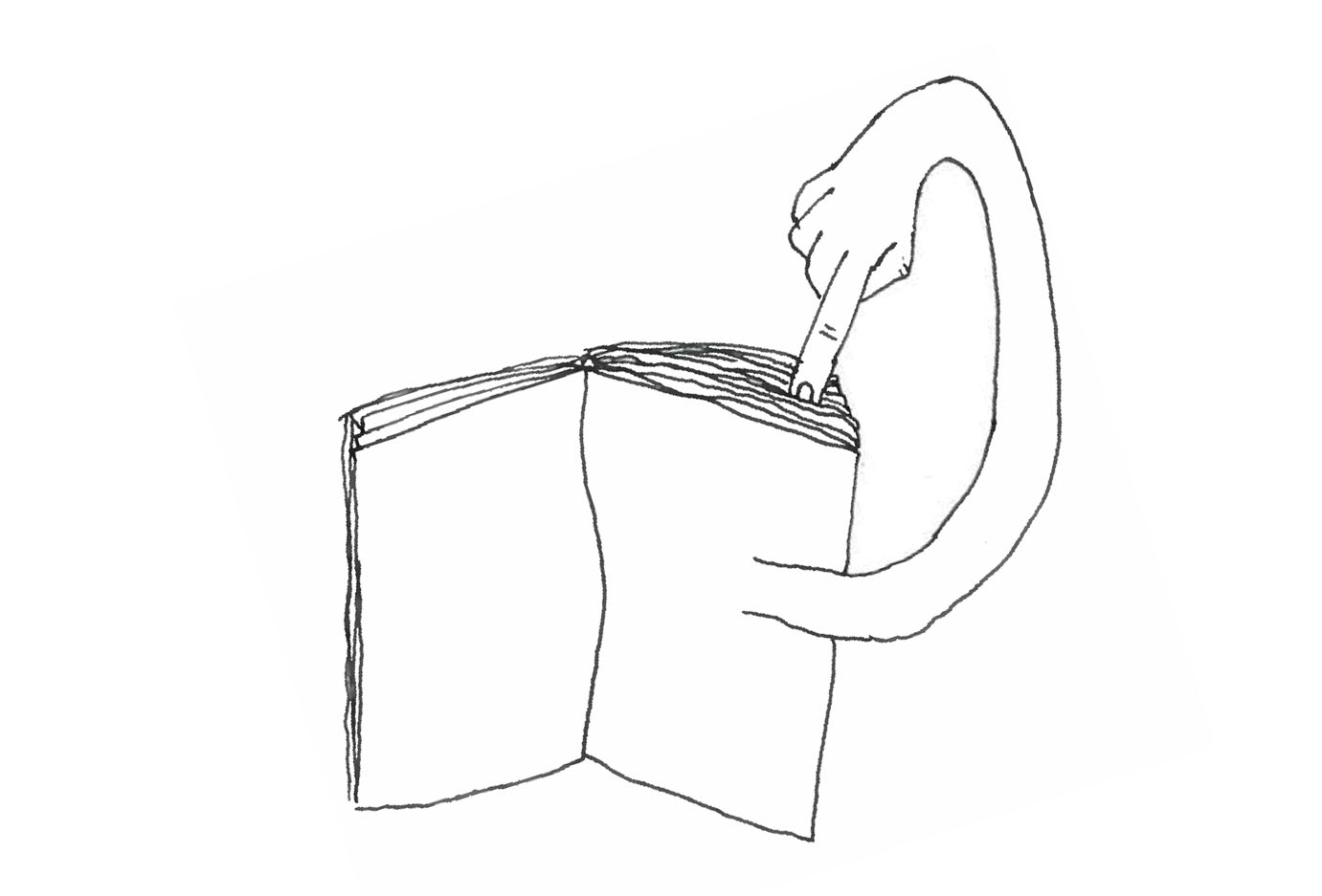 Litterært virkemiddel